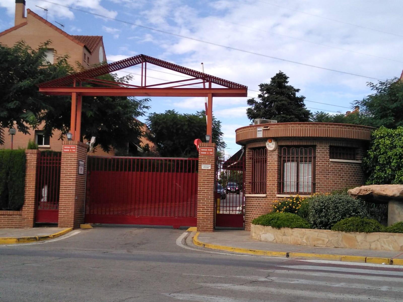 Foto del portal d'entrada al Sector C de Mas Camarena, Bétera